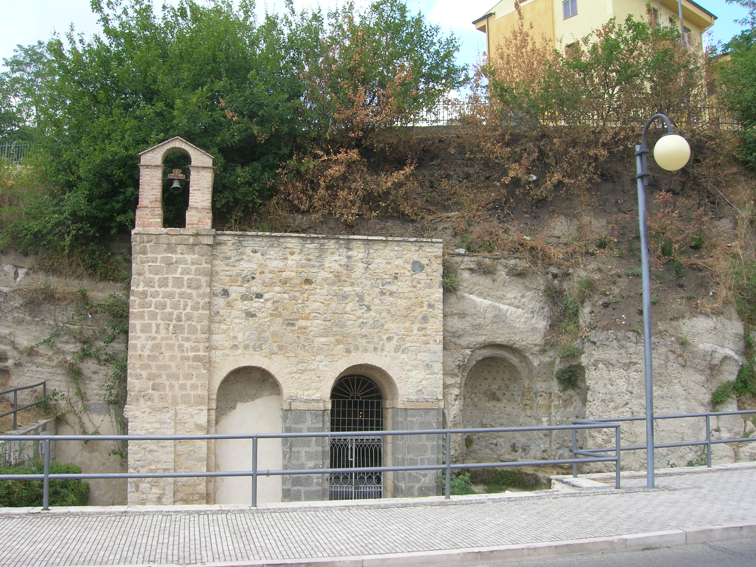 Chiesa Rupestre delle Spinelle, Melfi (Basilicata)